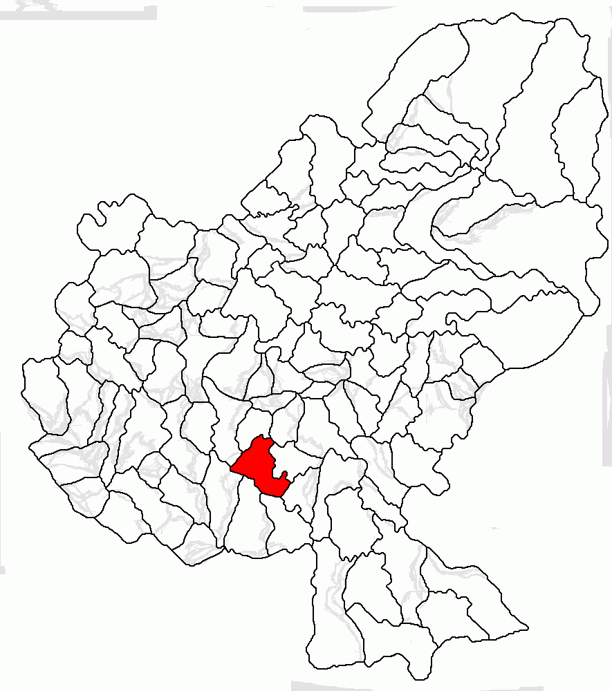 Categorie:Hărţi ale judeţului Mureş